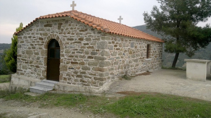 Η εκκλησία του Άϊ Γιώργη στο Κούτσουρο